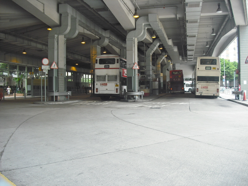 寶田巴士總站